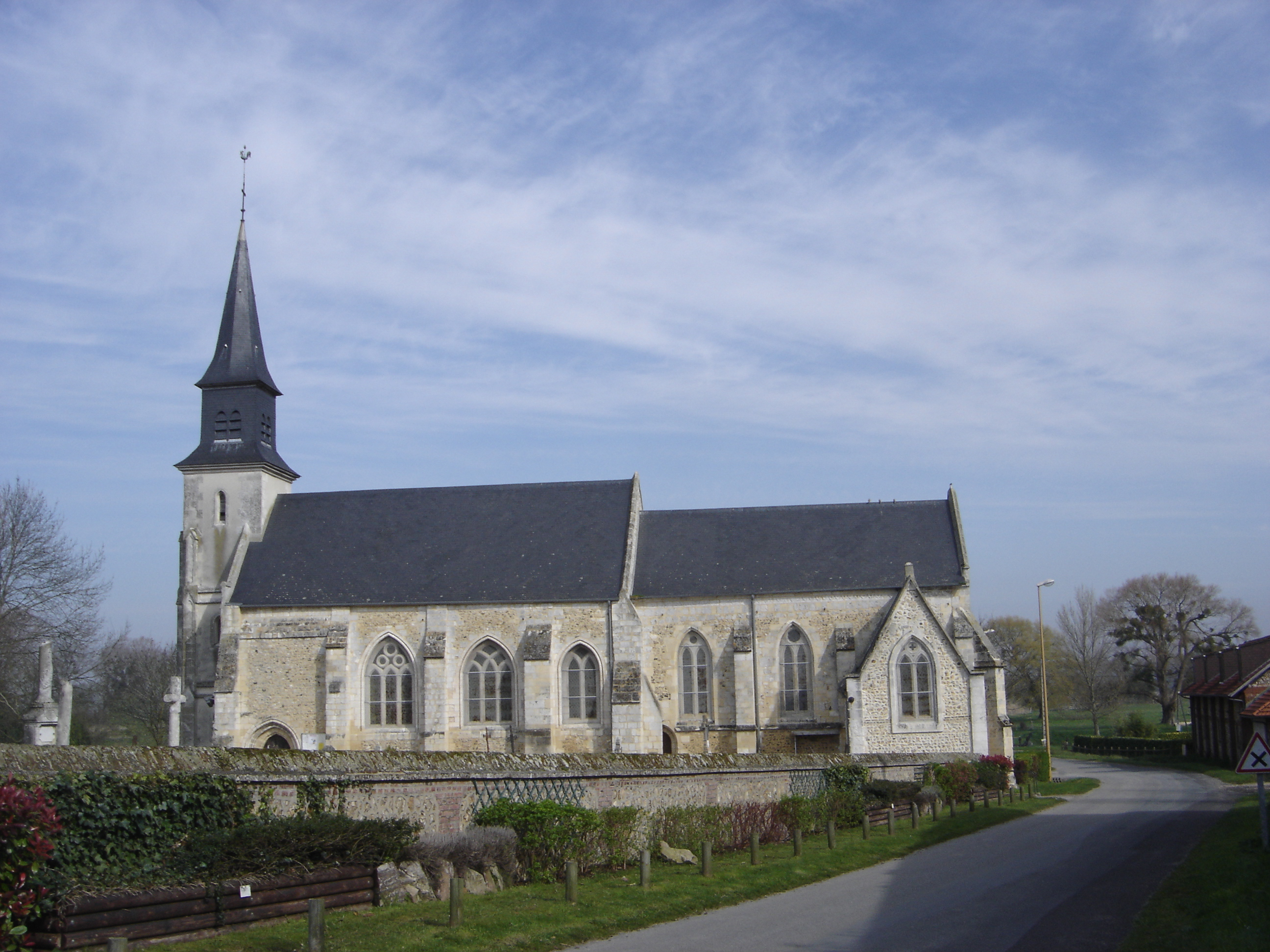 Eglise de Berville-sur-Mer - Eure - France